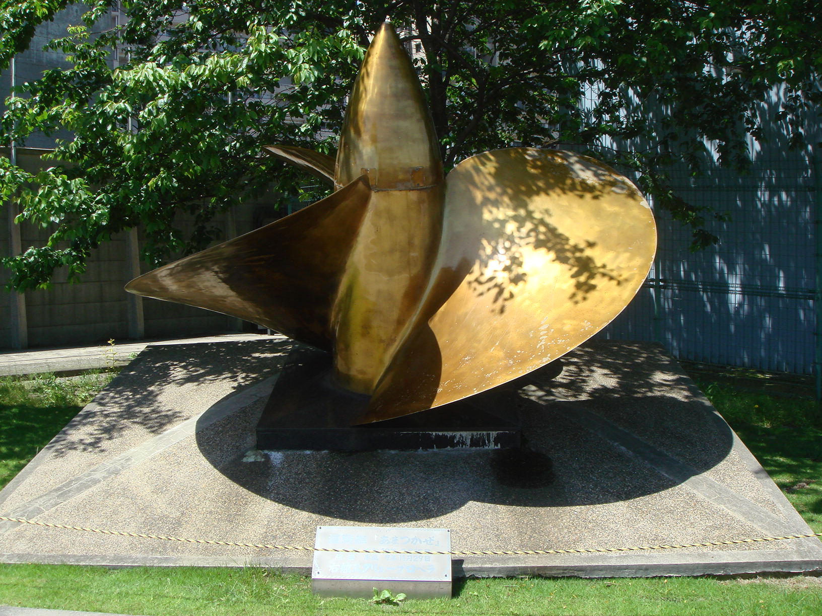 護衛艦あまつかぜ（DDG-163）の右舷スクリュープロペラ。 08年6月1日 海上自衛隊横須賀基地にて。